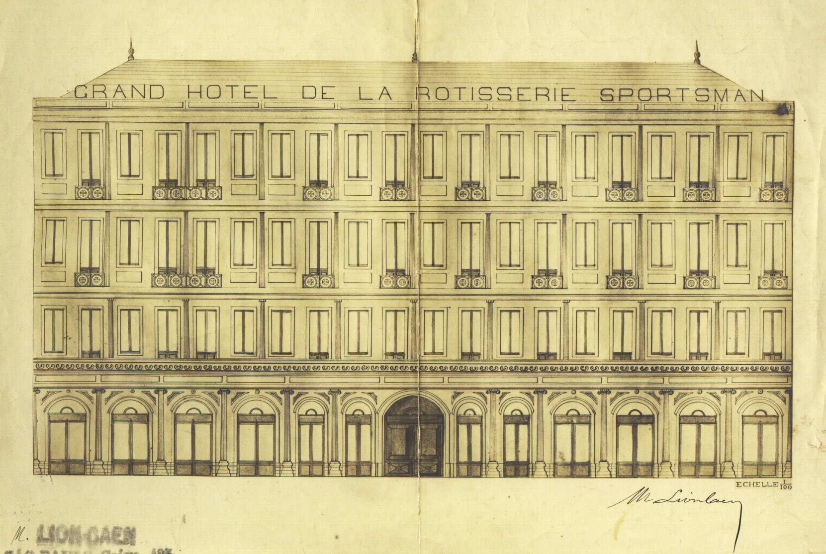 Obra que integra o acervo do Museu Paulista da USP. Coleção João Baptista de Campos Aguirra.